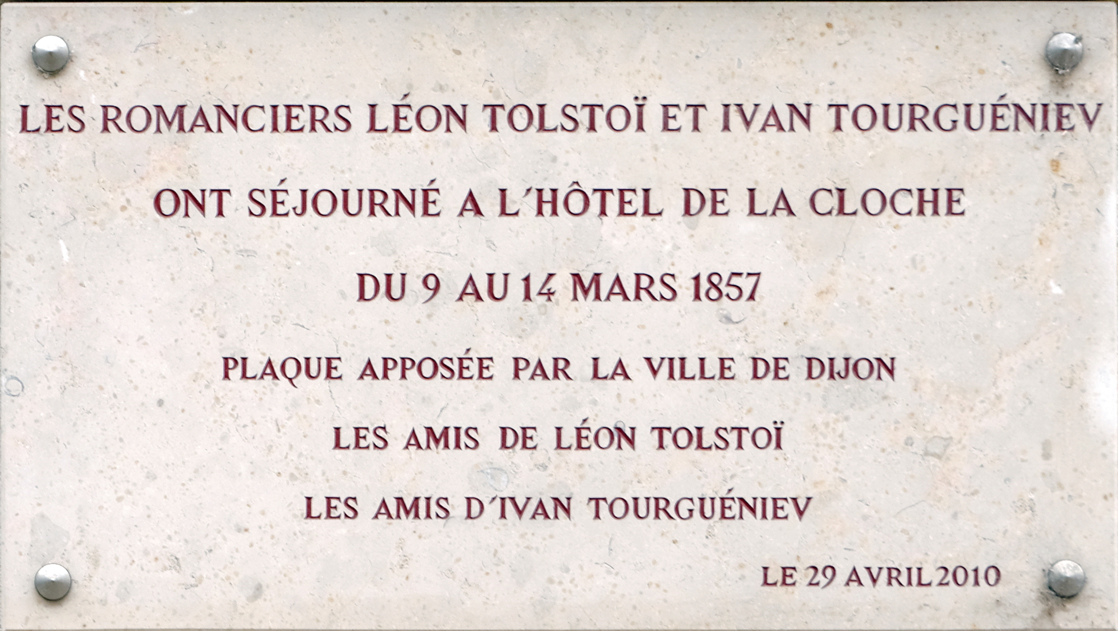 Plaque commémorant le séjour de Léon Tolstoï et Ivan Tourgueniev, en 1857, à Dijon au 9 rue de la Liberté, ancien Hôtel de la Cloche. (Dijon, Bourgogne Franche-Comté, France).